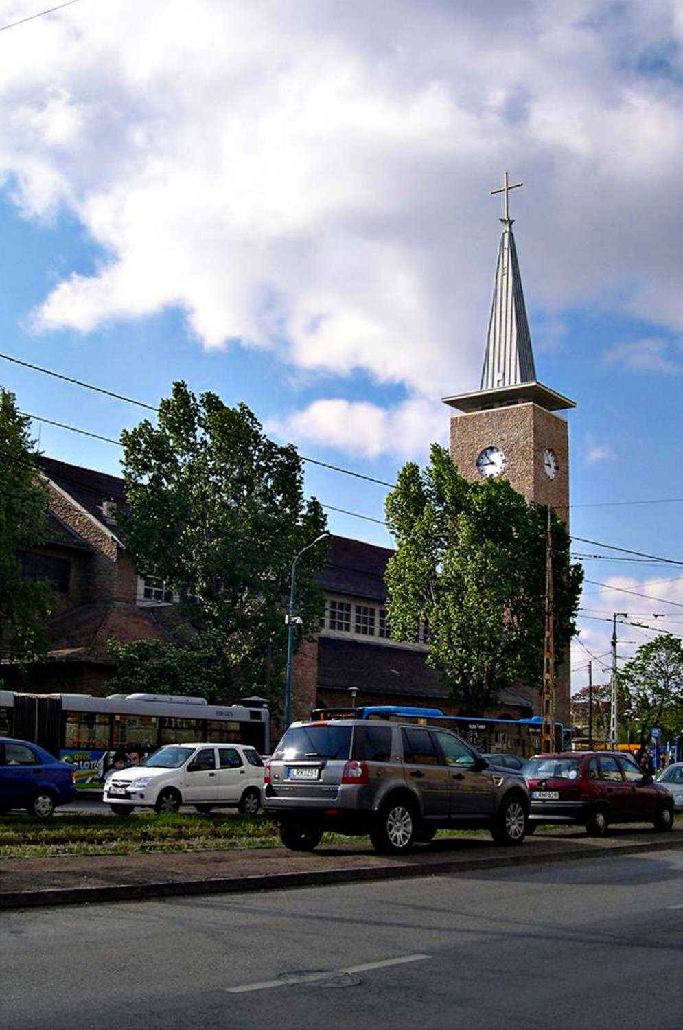 Bosnyák téri templom felújítva